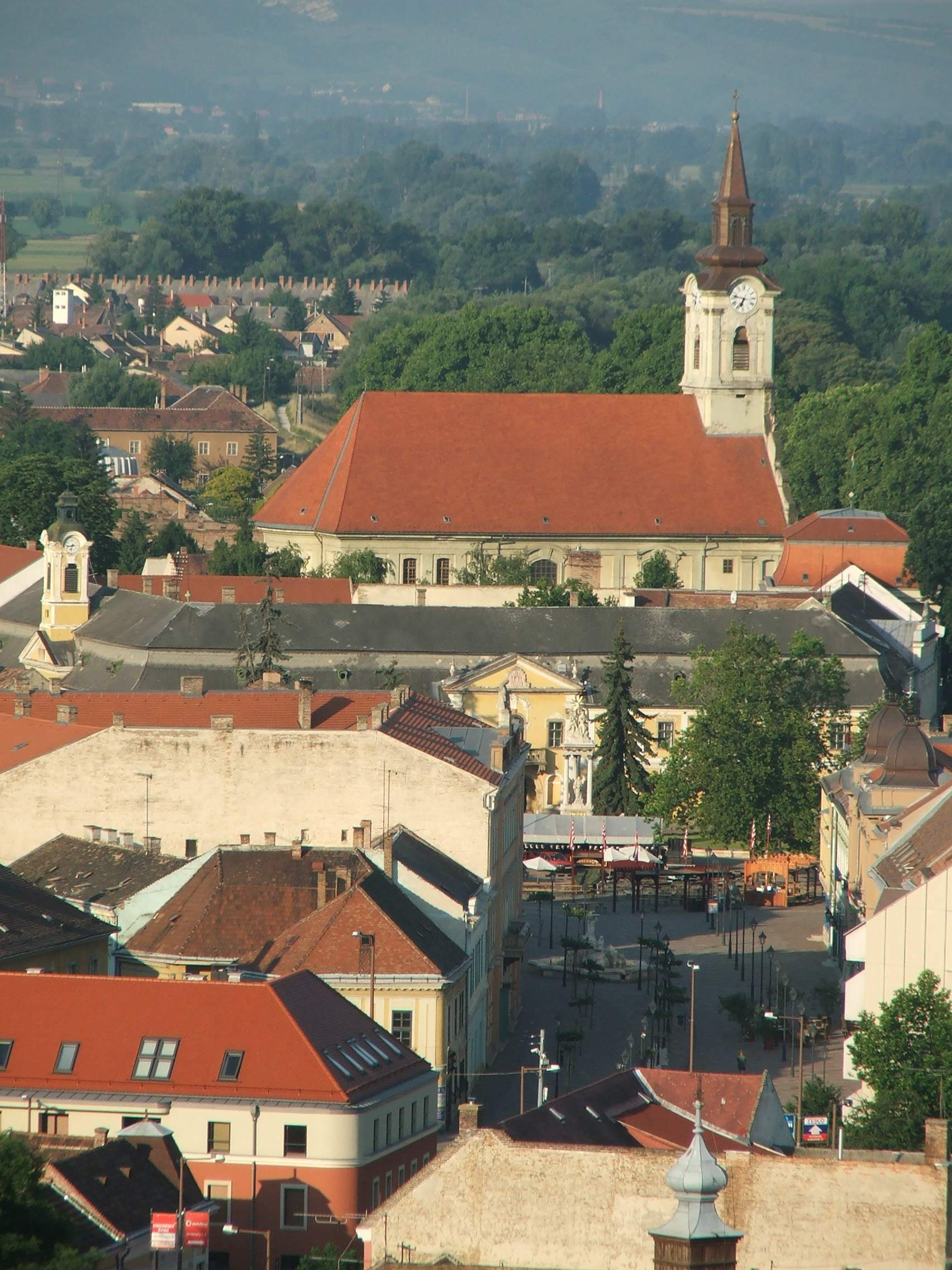 A belvárosi templom